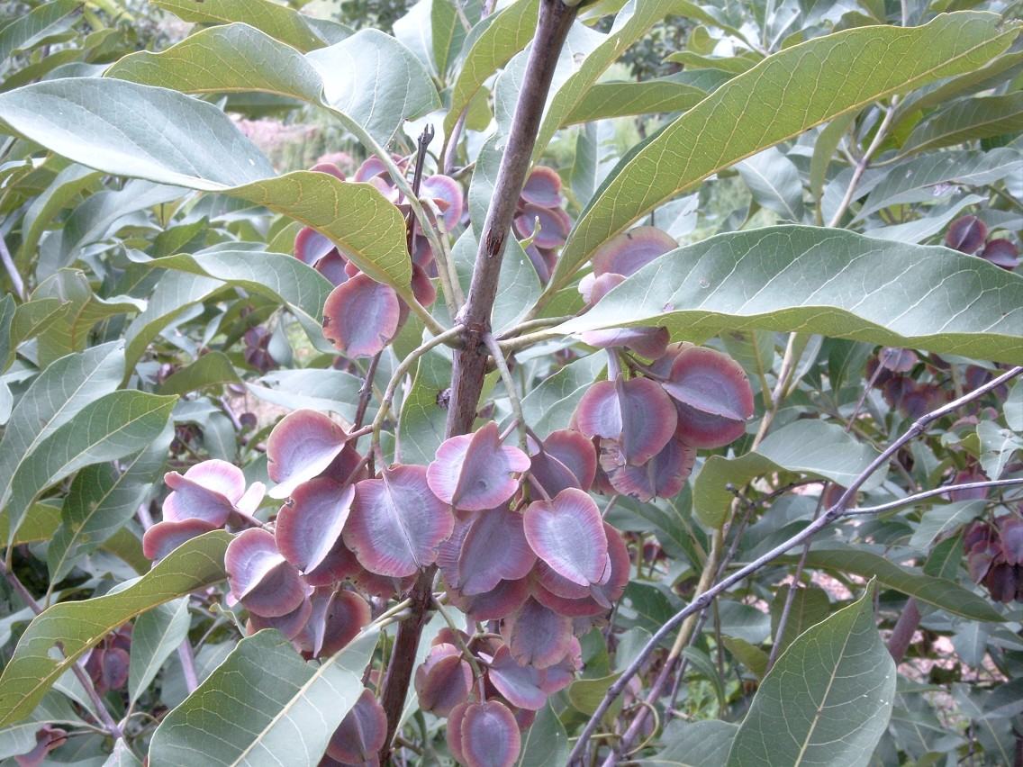 Combretum collinum near Fada N'Gourma, Burkina Faso.